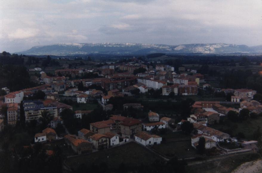 Foto de Espinosa de los Monteros en 1996